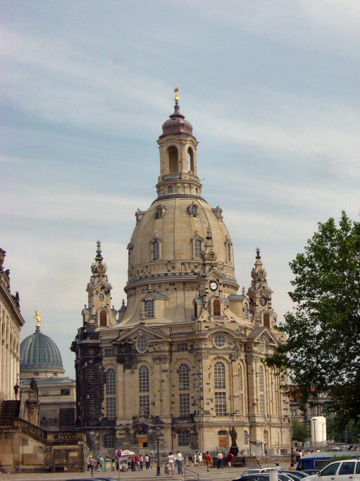 Frauenkirche te Dresden